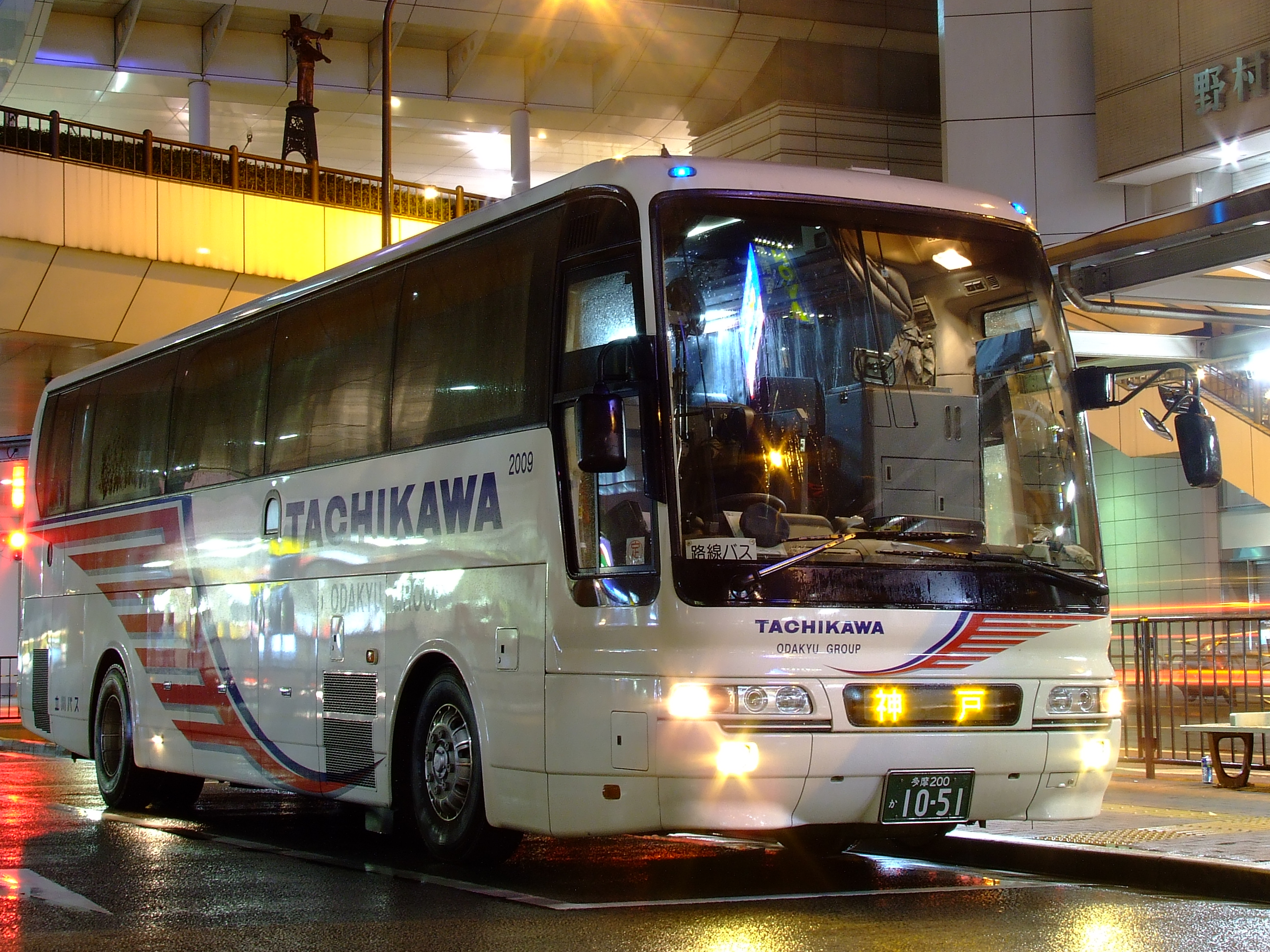 立川バスの夜行高速バス「シャルム号」神戸行き 立川駅北口にて